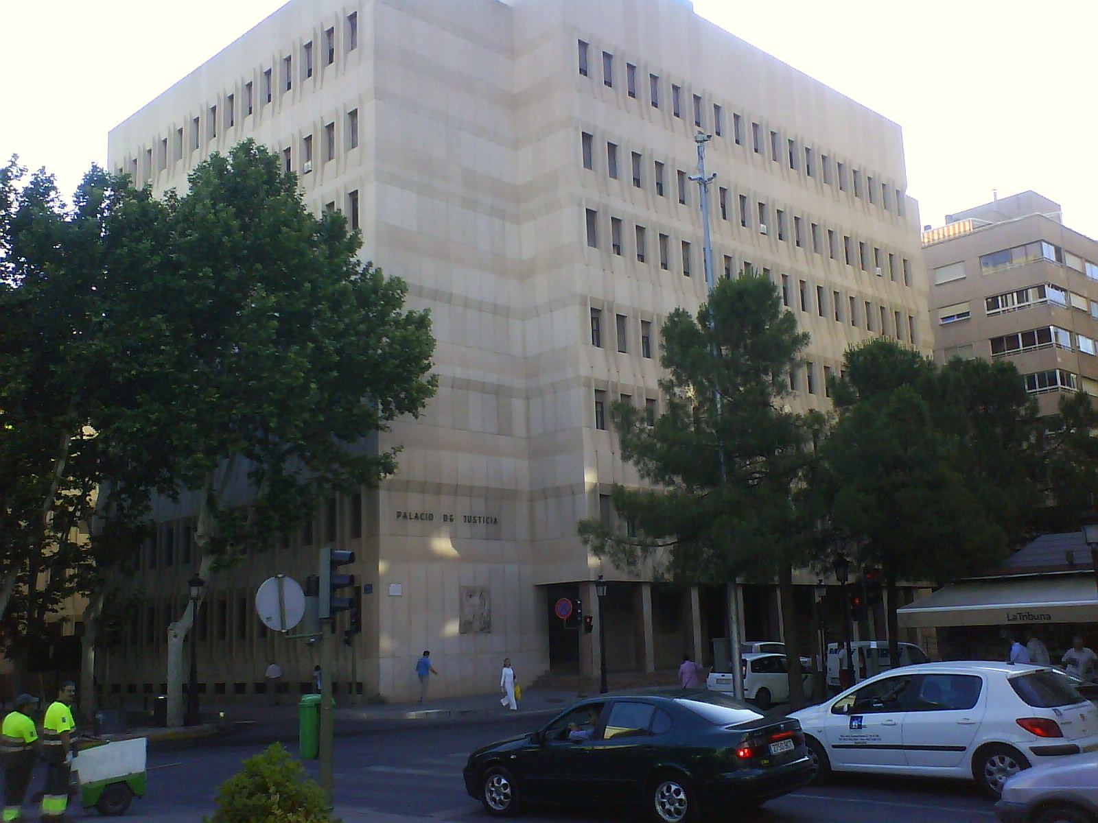 Edificio que acoge actualmente el Tribunal Superior de Justicia de Castilla-La Mancha situado en la ciudad de Albacete.